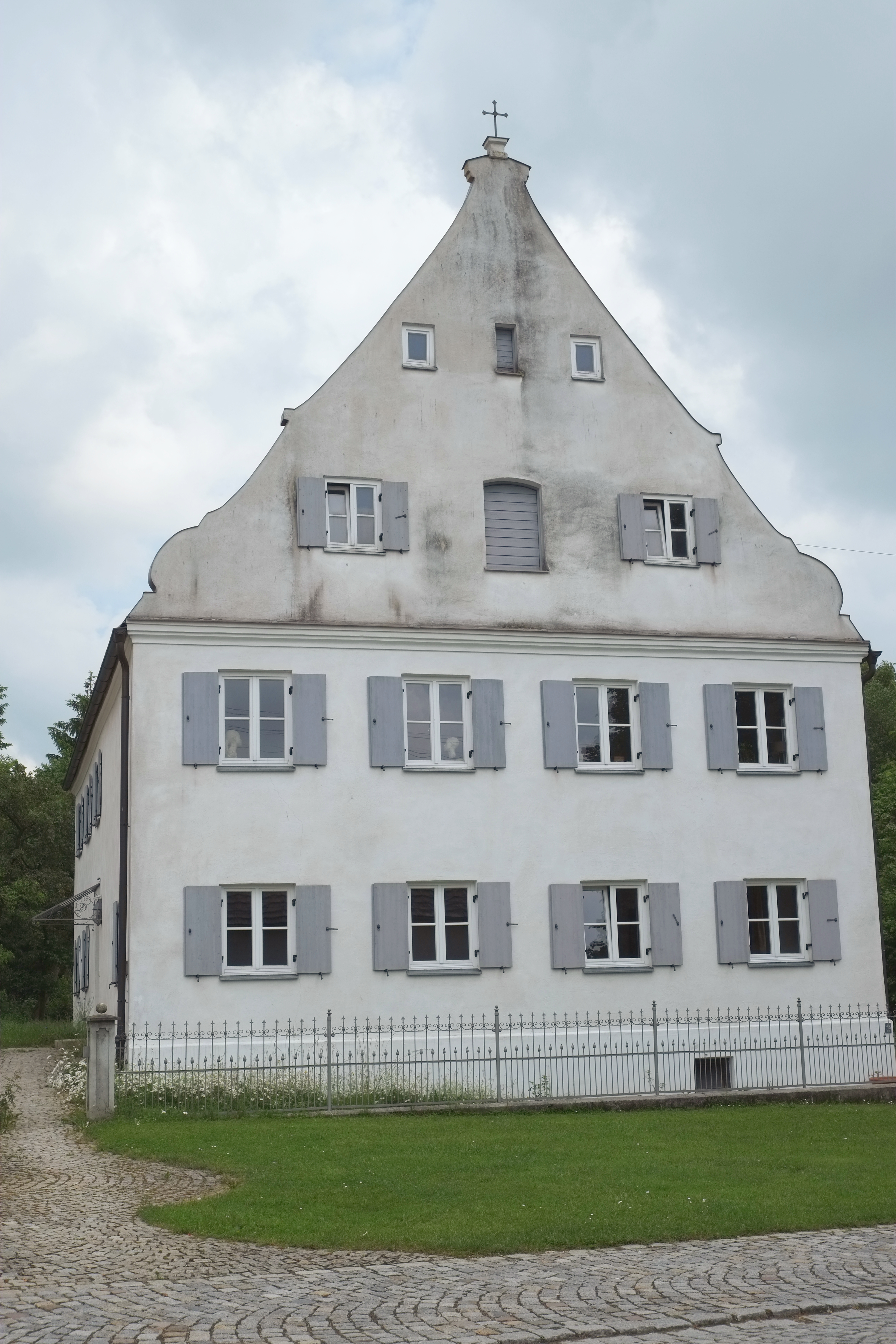 Pfarrhaus in Ettelried, einem Ortsteil von Dinkelscherben im Landkreis Augsburg (Bayern)